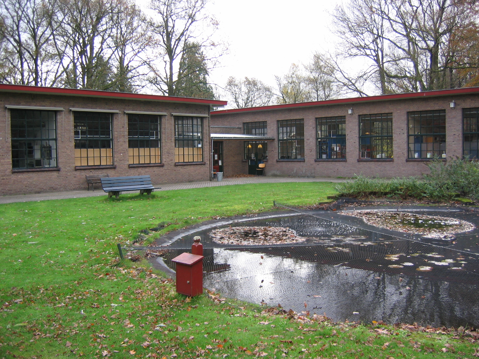 Werkplaatsgebouw Willem Arntsz hoeve. Den Dolder, Dolderseweg bij 164. Rijksmonument 510225. (Beschrijving door de RIjksdiens voor het Cultureel Erfgoed) Omschrijving complexonderdeel 3 Langs de rechterzijde van de centrale as gelegen gekoppelde WERKPLAATSPAVILJOENS die in een carrévorm gegroepeerd zijn. De werkplaatsen worden op twee hoeken door middel van lagere bouwvolumes met elkaar verbonden. Deze tussenvolumes hebben platte daken zonder overstek en bezittenn gesloten gevels, in tegenstelling tot het open karakter van de gevels van de werkplaatsen. De paviljoens zijn één bouwlaag hoog en hebben overstekende platte daken. De gevels zijn uit baksteen in klezoorverband opgetrokken en zijn voorzien van groten stalen twaalfruitsvensters met keramische onderdorpels. Op de hoeken bevindt zich een stalen rondvenster. De paviljoens hebben verschillende afmetingen. Het paviljoen aan de westzijde is negen vensterassen breed, het paviljoen aan de zuidzijde is veertien vensterassen breed, aan de oostzijde staat een paviljoen van zes vensterassen breed, aan de noordzijde bevind zich een paviljoen van vijf vensterassen breed en tot slot in de noordwest hoek staat het kleinste, geheel vrijstaande paviljoen met een aanbouw overeenkomstig de eerder genoemde lagere bouwvolumes. Deze aanbouw heeft een gewijzigde vensterindeling. Aan de west- en noordzijde van de carrévorm bevinden zich doorgangen naar de binnenplaats met een gazon en een ronde vijver. Deze binnenplaats valt onder de rijksbescherming. Waardering complexonderdeel 3 Van cultuurhistorische waarde als voorbeeld van een therapievorm die in de eerste helft van de 20ste eeuw ontwikkeld werd, alsmede van architectuurhistorische betekenis vanwege de Nieuw-Zakelijke invloeden en bouwtype en als onderdeel van het oeuvre van architect Mertens. Tevens van ensemble waarde als onderdeel van de W.A. Stichting.